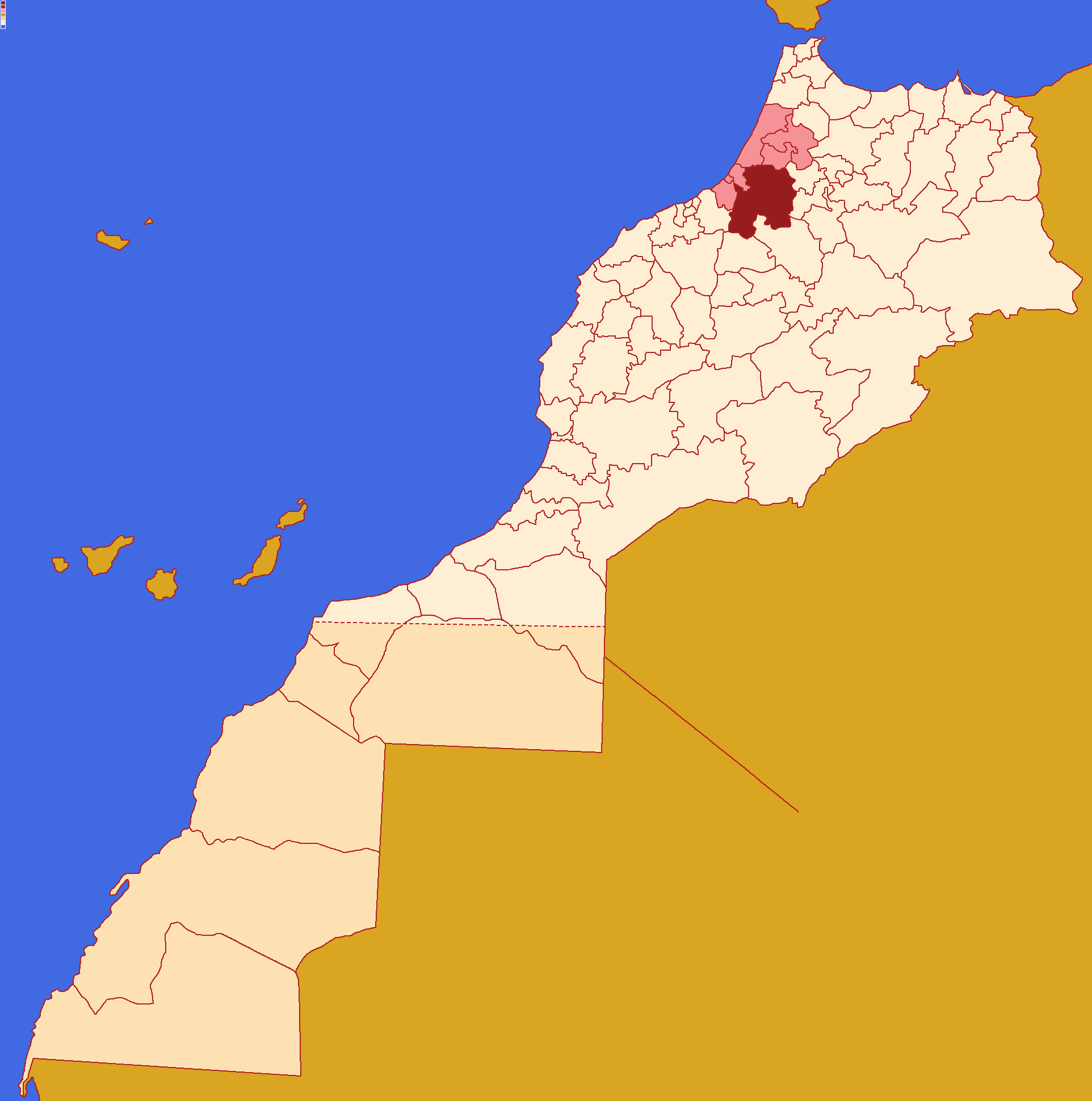 Localização da província de Khémisset dentro da região de Rabate-Salé-Quenitra e dentro de Marrocos. Conforme a reforma administrativa de 2015.